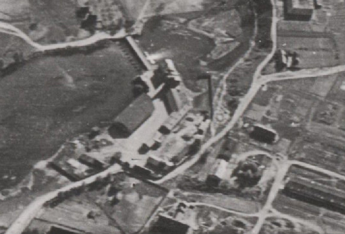 Беларуская (тарашкевіца): Менск (Miensk), Сакалянка (Sakalanka). Крухмальна-патачны завод Любанскага "Сокал" i млын Гурвiча. Аэрафотаздымак